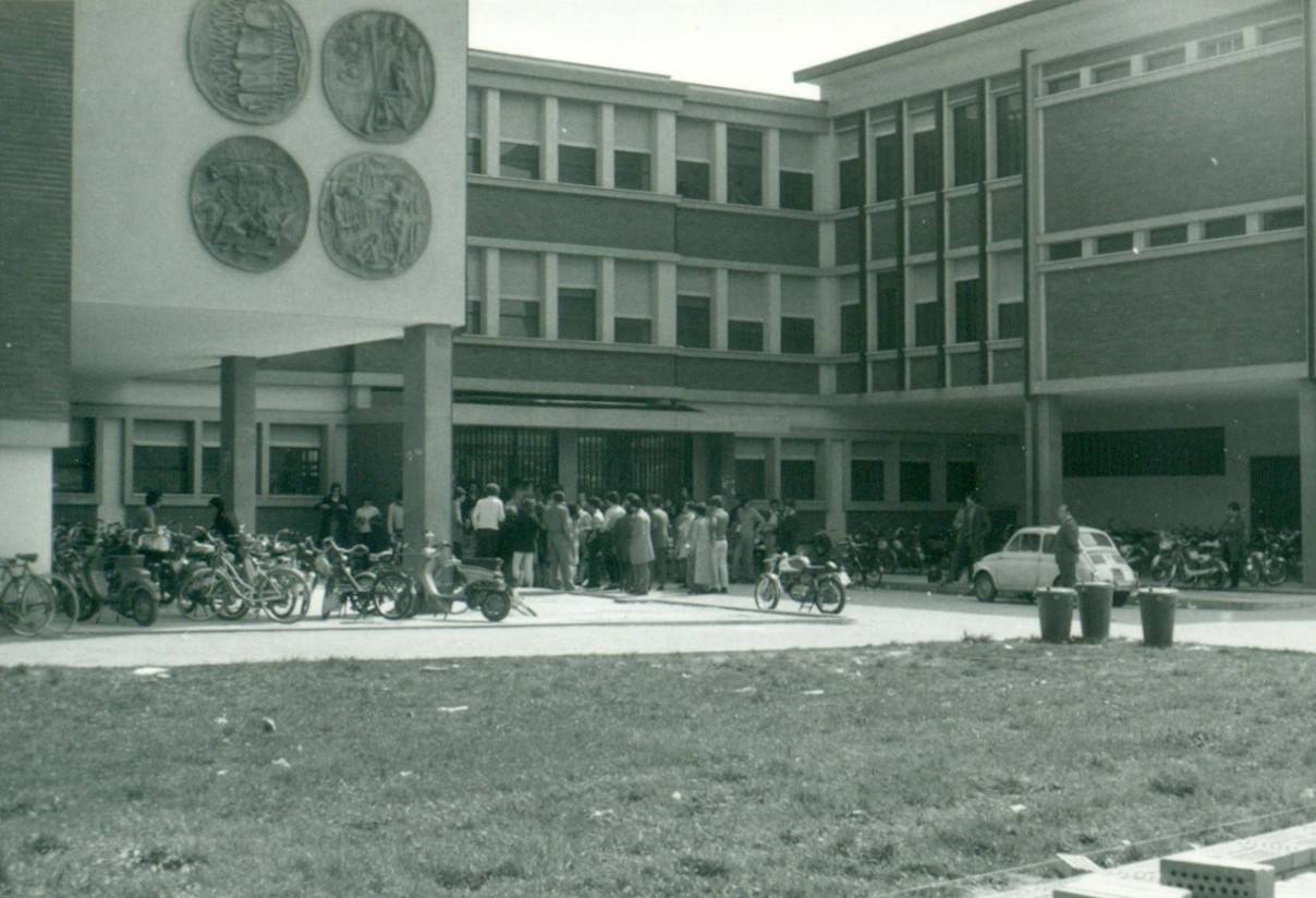 Immagine provenienti da mio archivio personale digitalizzato - Liceo scientifico Antonio Roiti negli anni 70